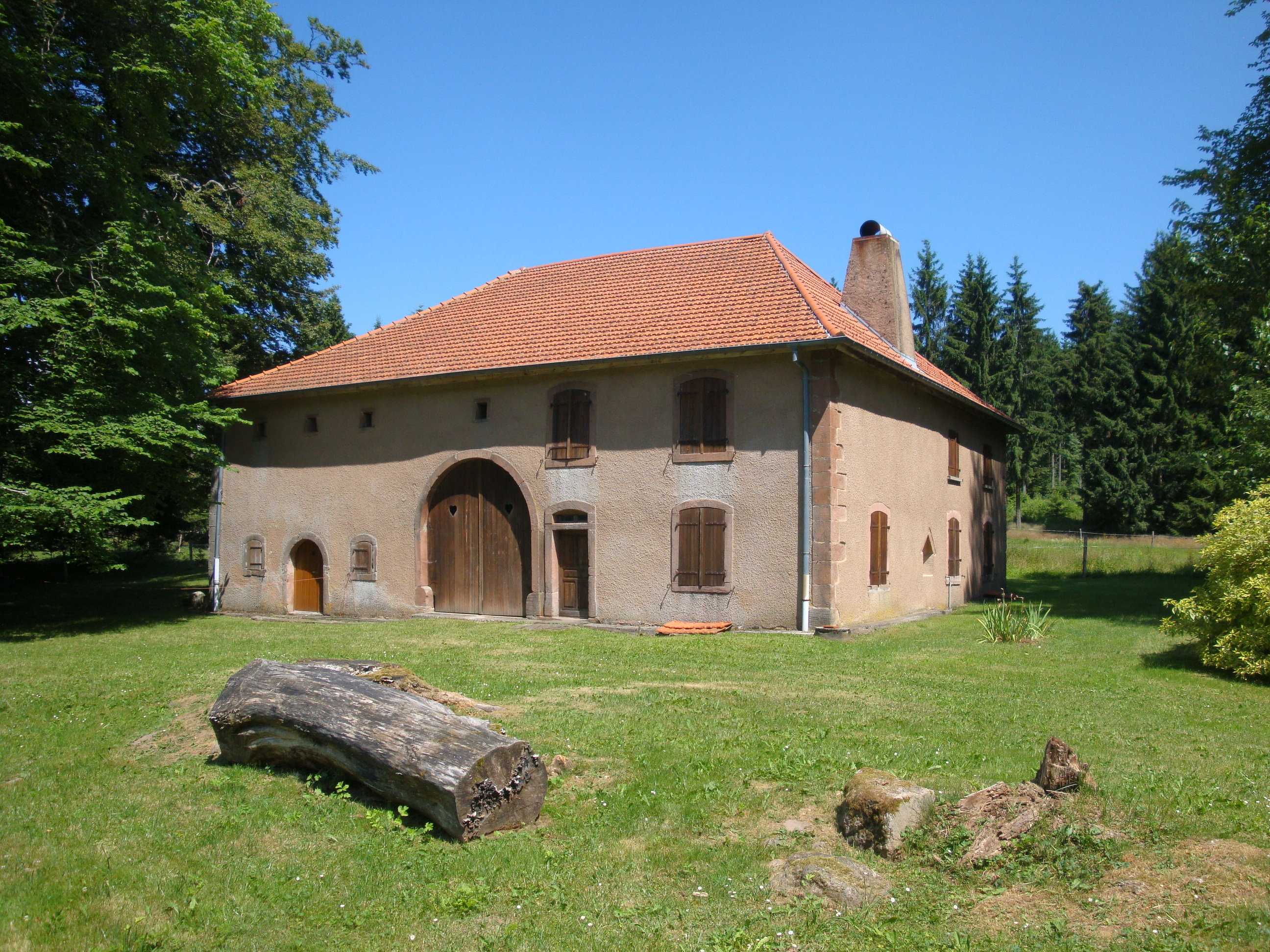 Photo de la Cense de Belfays (Belfey), Principauté de Salm, Saint Stail alt 774m, ferme seigneuriale, XVIIs grégoire LALLEMAND (1711-1786) est censier en 1736 avec sa famille (marguerite SCHENEBEL sa femme et 7 enfants) Une inscription est à déchiffrer à la base de l'angle droit du bâtiment